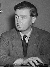 Teitl Cymraeg/Welsh title: Dadl ar y BBC rhwng Iorwerth Thomas (AS Rhondda) a Gwynfor Evans Ffotograffydd/Photographer: Geoff Charles (1909-2002) Dyddiad/Date: 28/9/1951 Cyfrwng/Medium: Negydd ffilm / Film negative Cyfeiriad/Reference: (gch02279) Rhif cofnod / Record no.: 3368285 Rhagor o wybodaeth am gasgliad Geoff Charles yn Llyfrgell Genedlaethol Cymru More information about the Geoff Charles Collection at the National Library of Wales Mae ffotograffau Geoff Charles hefyd yn rhan o Broject Europeana Libraries Geoff Charles' photographs also form part of the Europeana Libraries Project